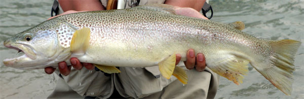 Salmo trutta marmorata aus der Piave in Belluno/Venetien Sommer 2003 (für Public Domain)